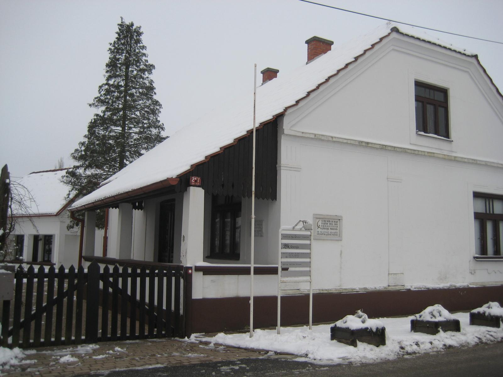 Miško Kranjec house in Velika Polana, Slovenia